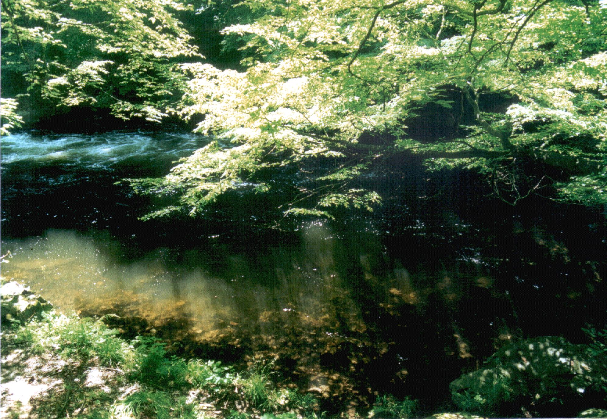 Zahme Bode nördlich von Thale. Der Hornfels bildet das Bachbett und hebt sich dunkel ab.